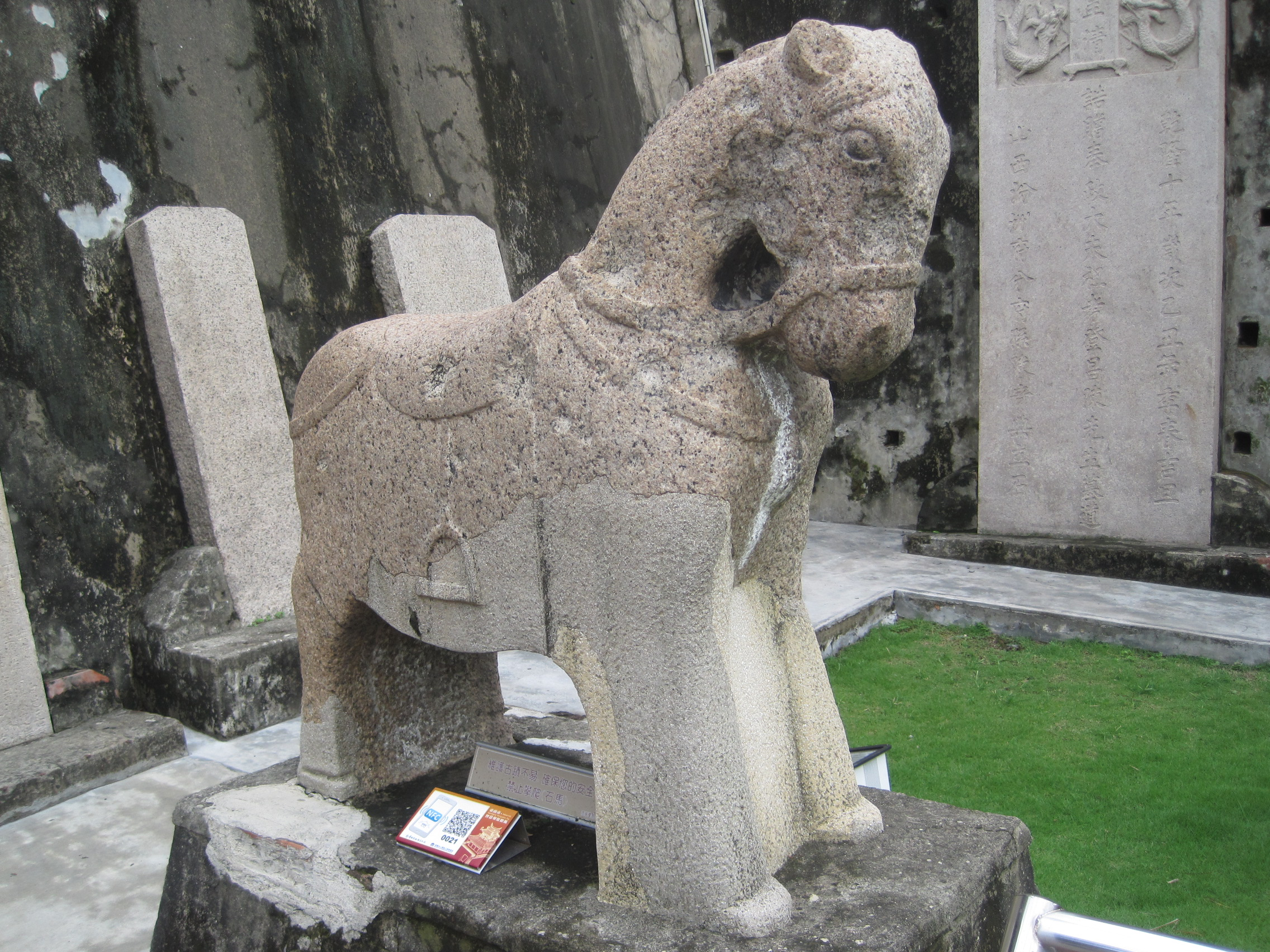 赤嵌樓石馬，原屬鄭其仁墓。